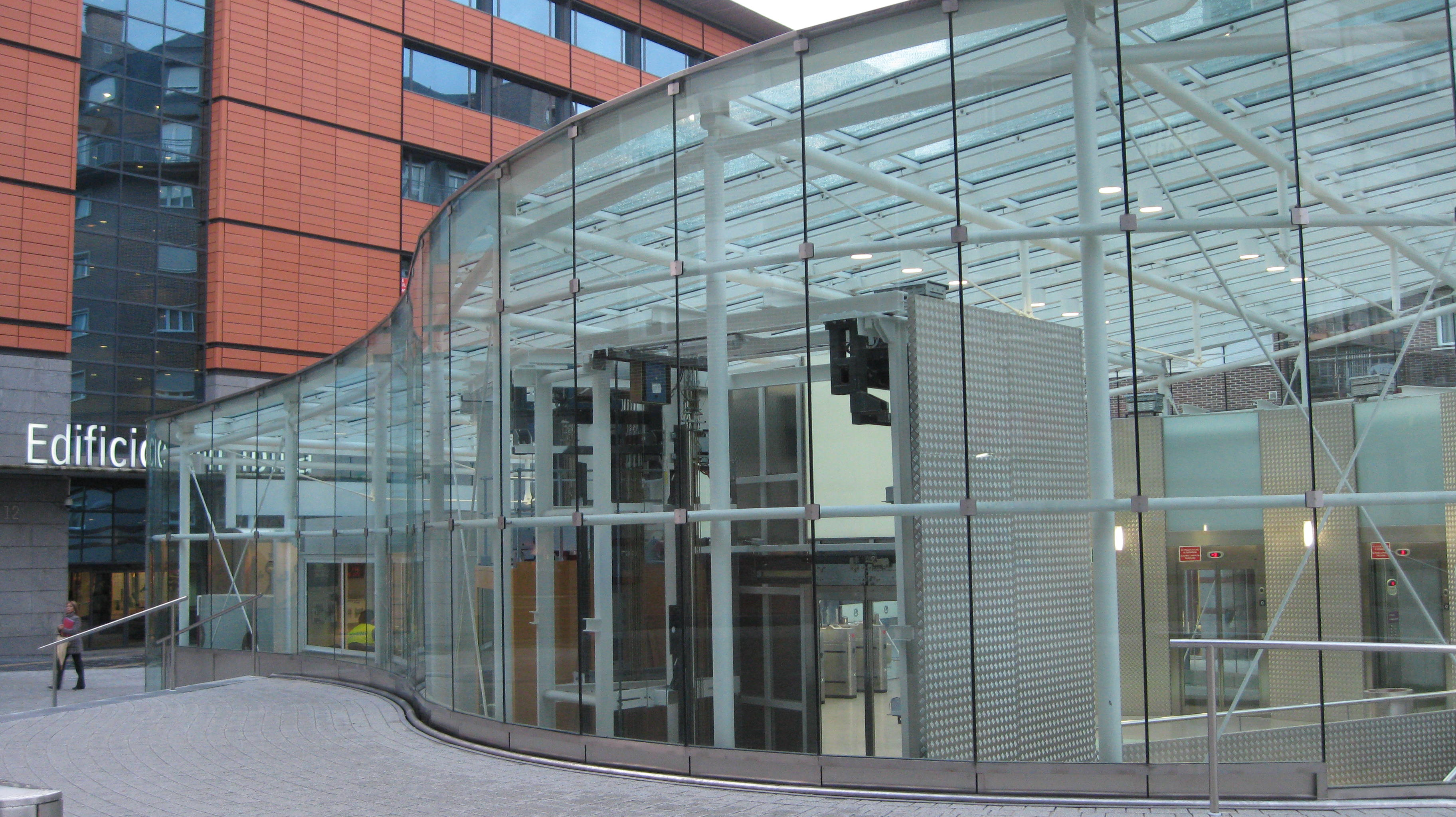 Edificio de la estación de Miribilla (Bilbao, Vizcaya, País Vasco).